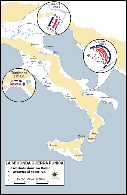 Traduzione di File:Second Punic War Battles.gif in versione PNG